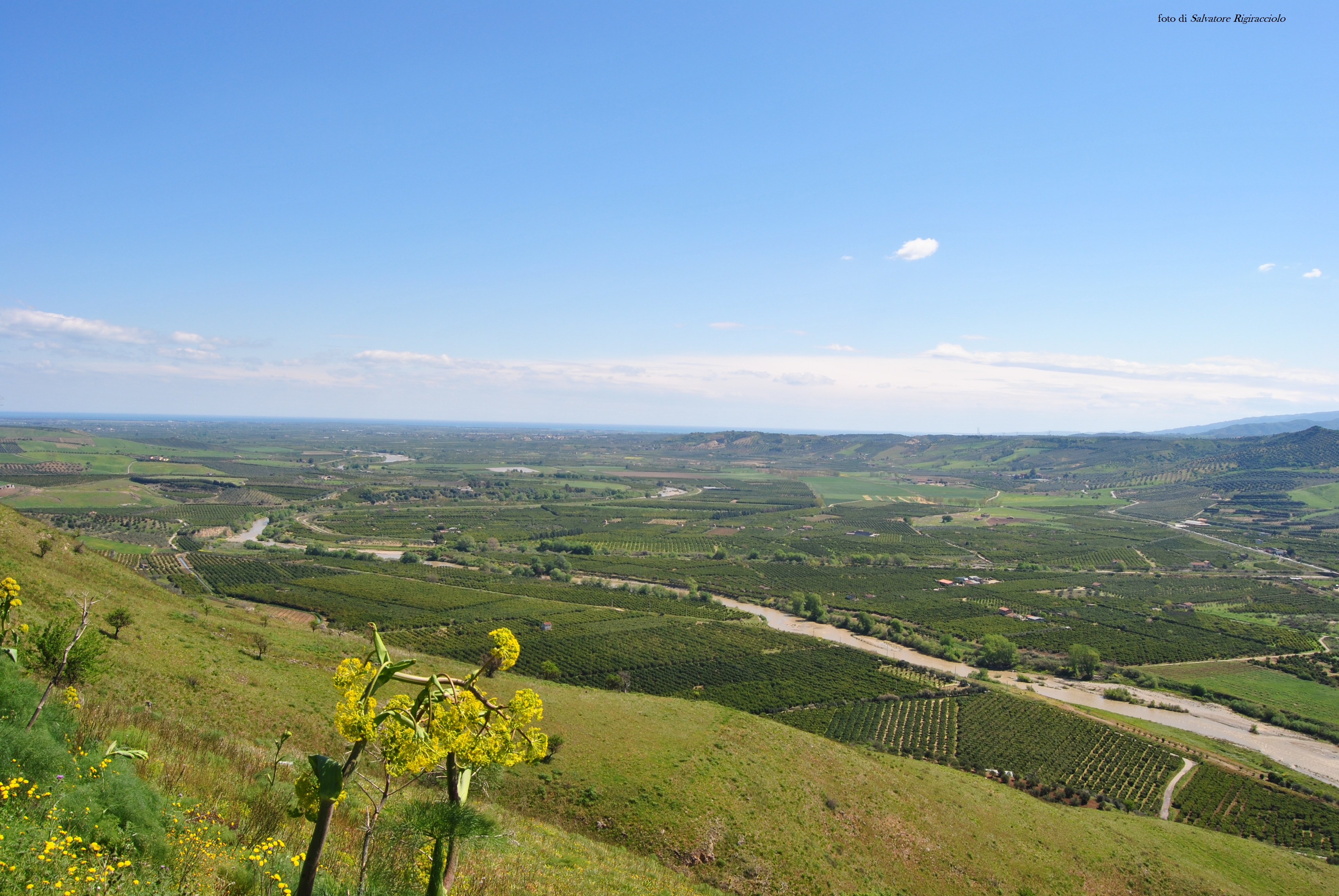 foto di Salvatore Rigiracciolo, scattata in data 08/04/2012. Vista della pianura di Sibari dalla collina di Terranova da Sibari.